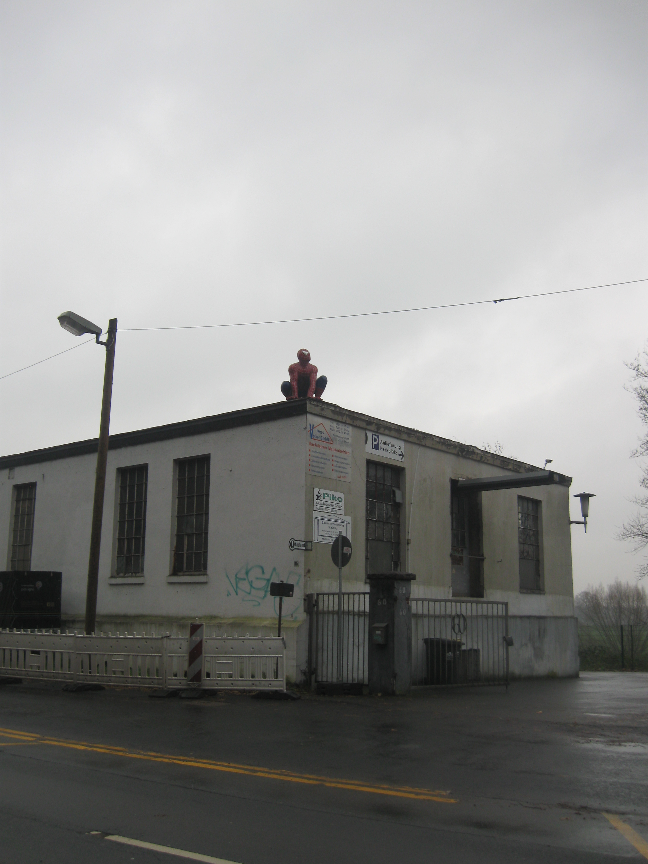 Espaidermen escalando un techo en Essen